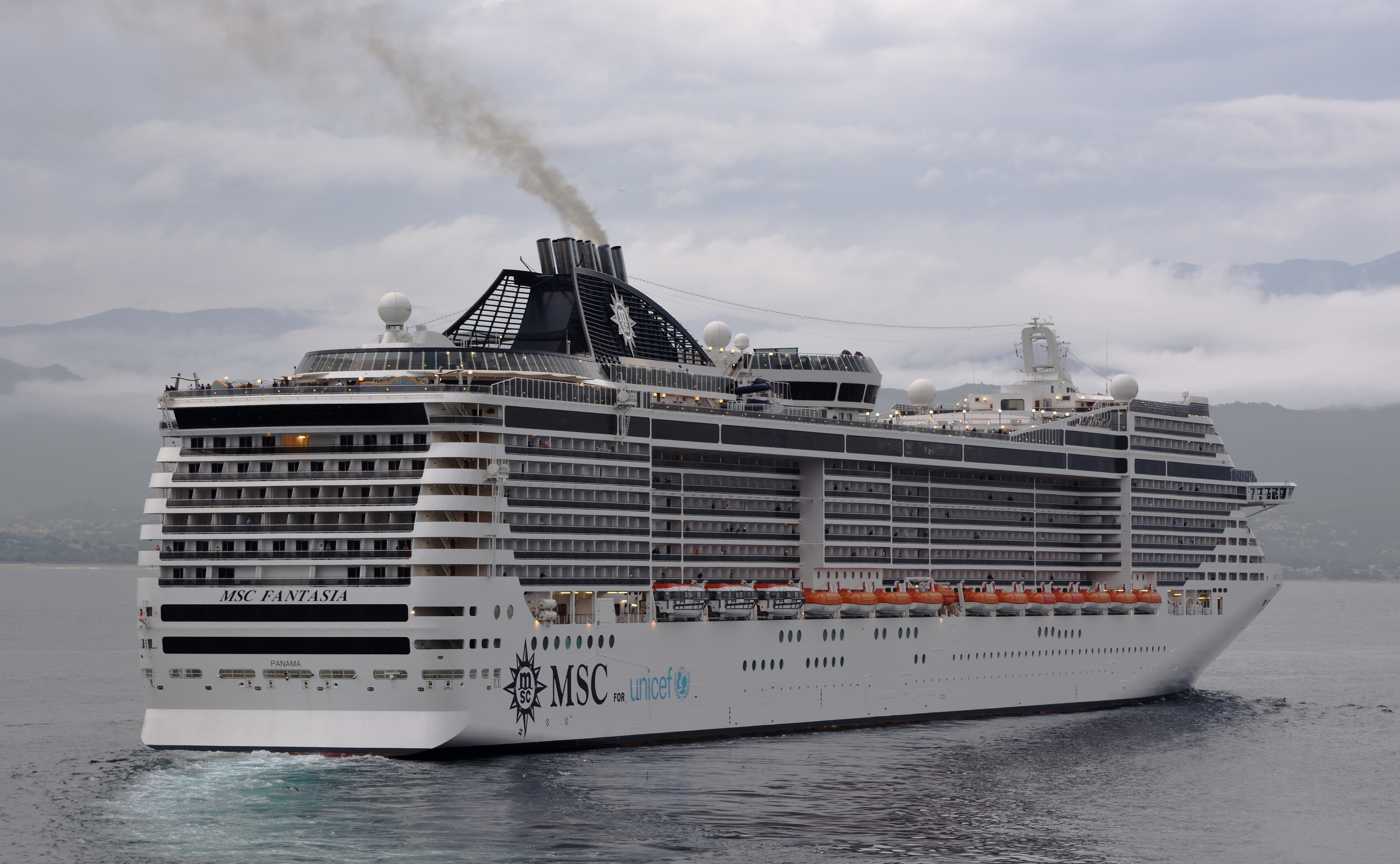 MSC Fantasia sortant le port d`Ajaccio en Corse